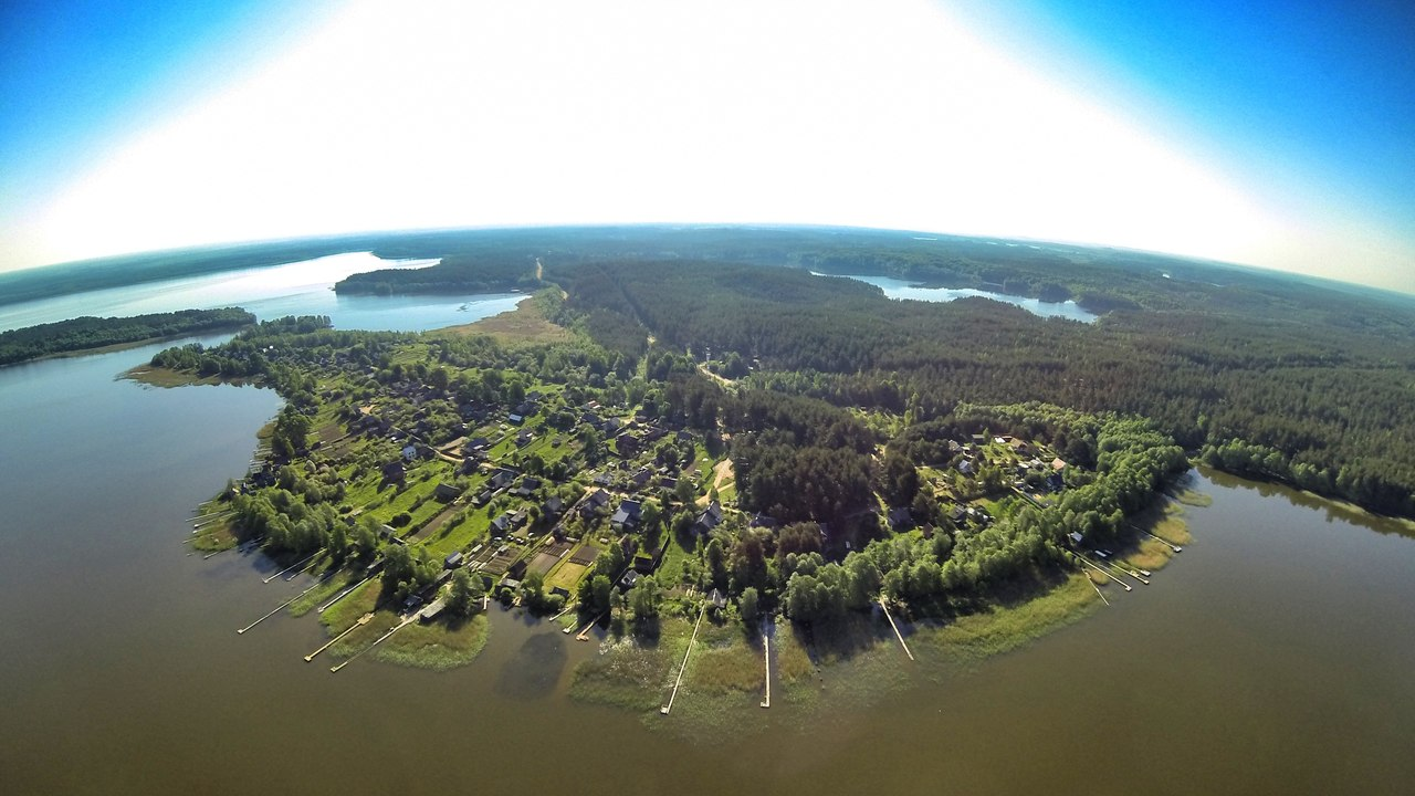 Сяберский заказник, Лужский район This image is related to the protected area of Russia number 4710150